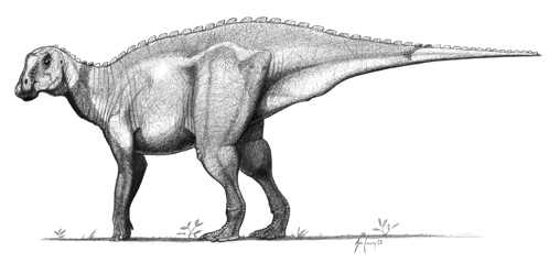 The hadrosaurid dinosaur Gryposaurus notibilis